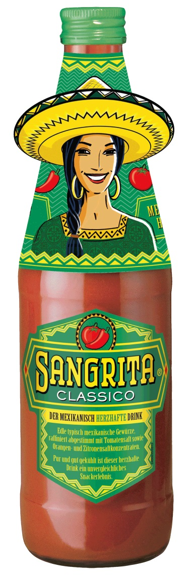 Ausstattung von Sangrita grün